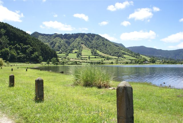 Lagoa das Sete Cidades, Ilha de São Miguel, Açores, Portugal.